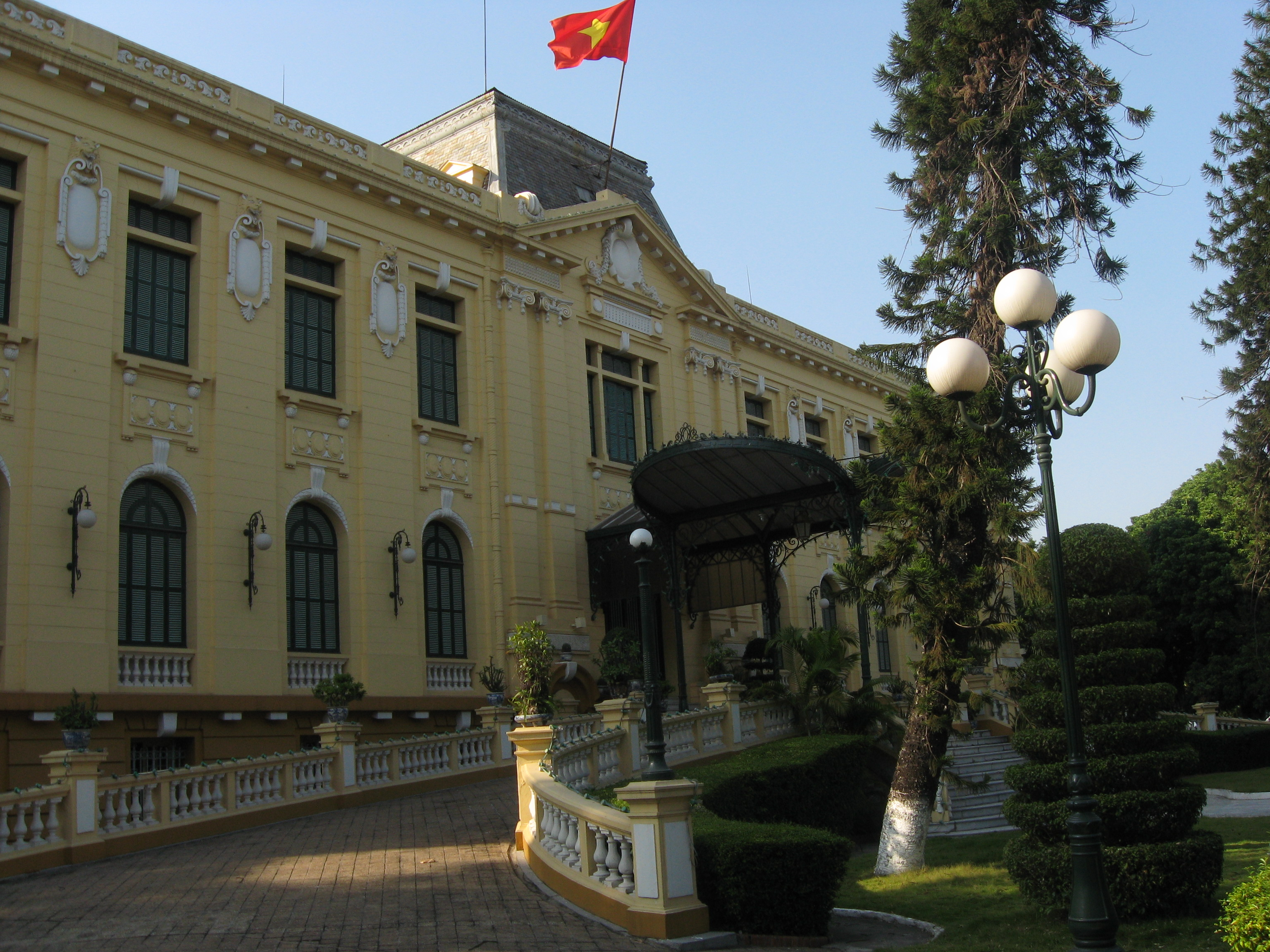 Bac Bo phu (Hôtel de la Résidence Supérieure), Hanoi, Vietnam